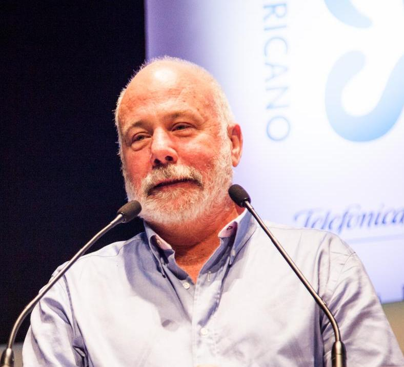 fotos por Victoriano Izquierdo ( @victorianoi )